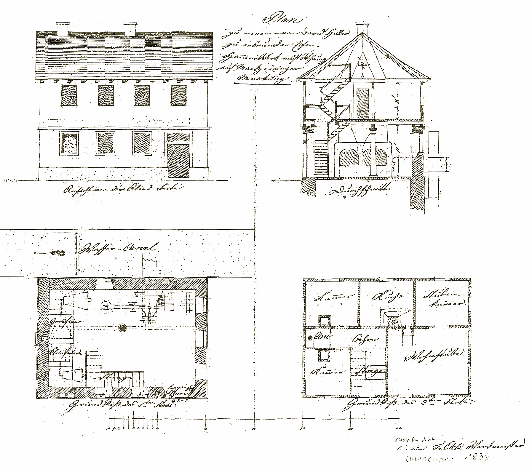 Bauplan Hellers für die Genehmigung der Hammerschmiede in Talhausen (1838)